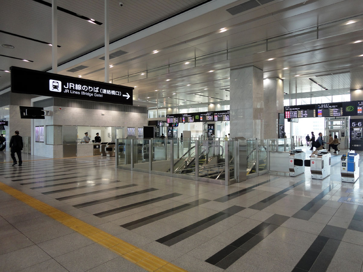 大阪駅連絡橋口改札